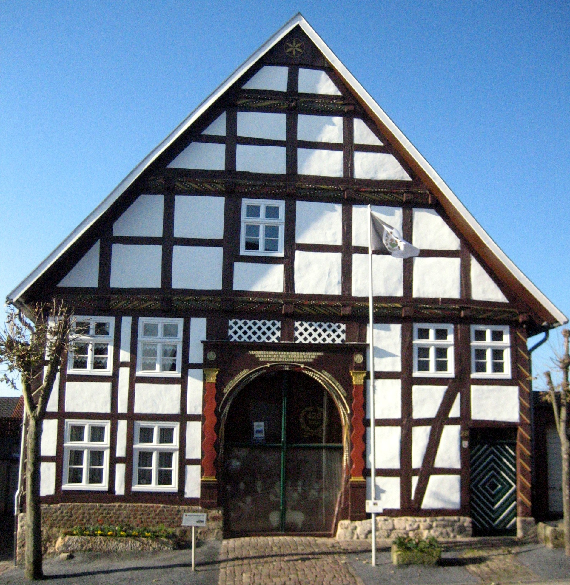 Liste der Baudenkmäler in Marsberg, Denkmalnummer 6